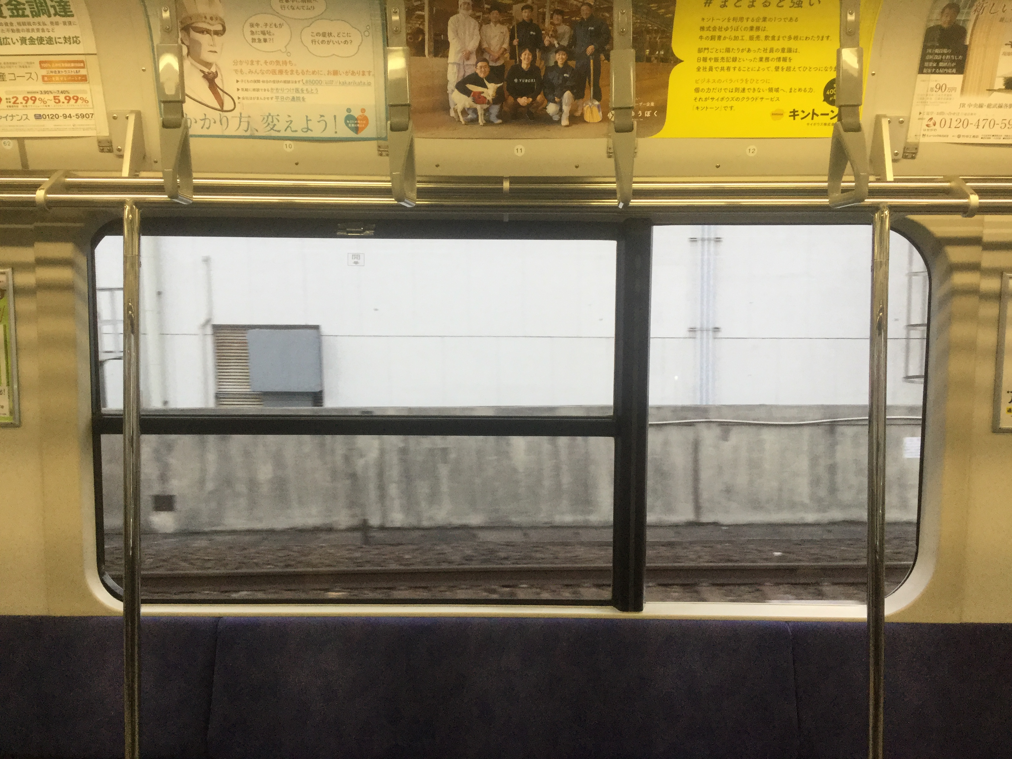 クハE231-901の側面窓。209系500番台と同型である。